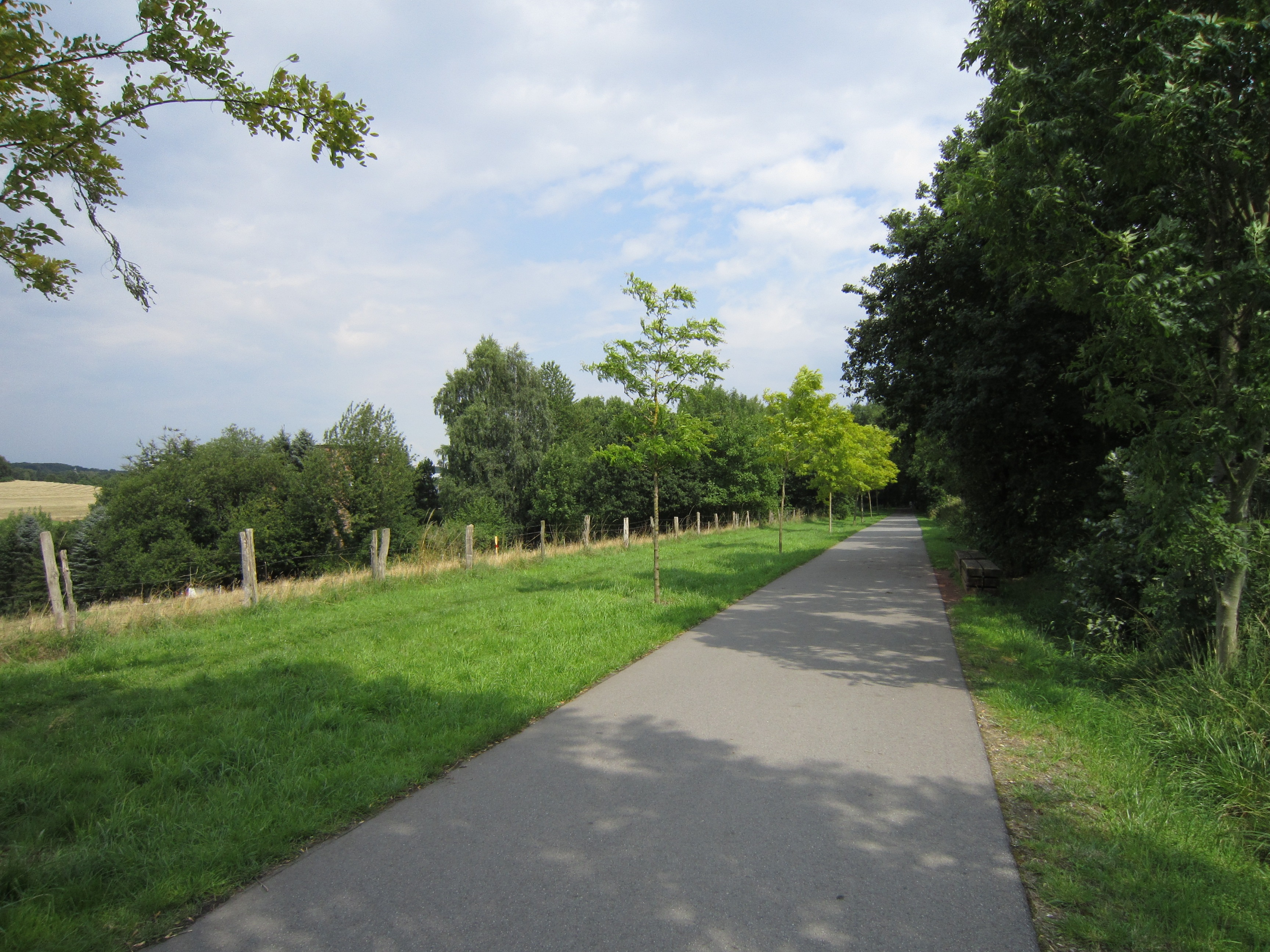 Korkenziehertrasse in Höhe der Hundewiese Fuhr, aufgenommen im Juli 2015